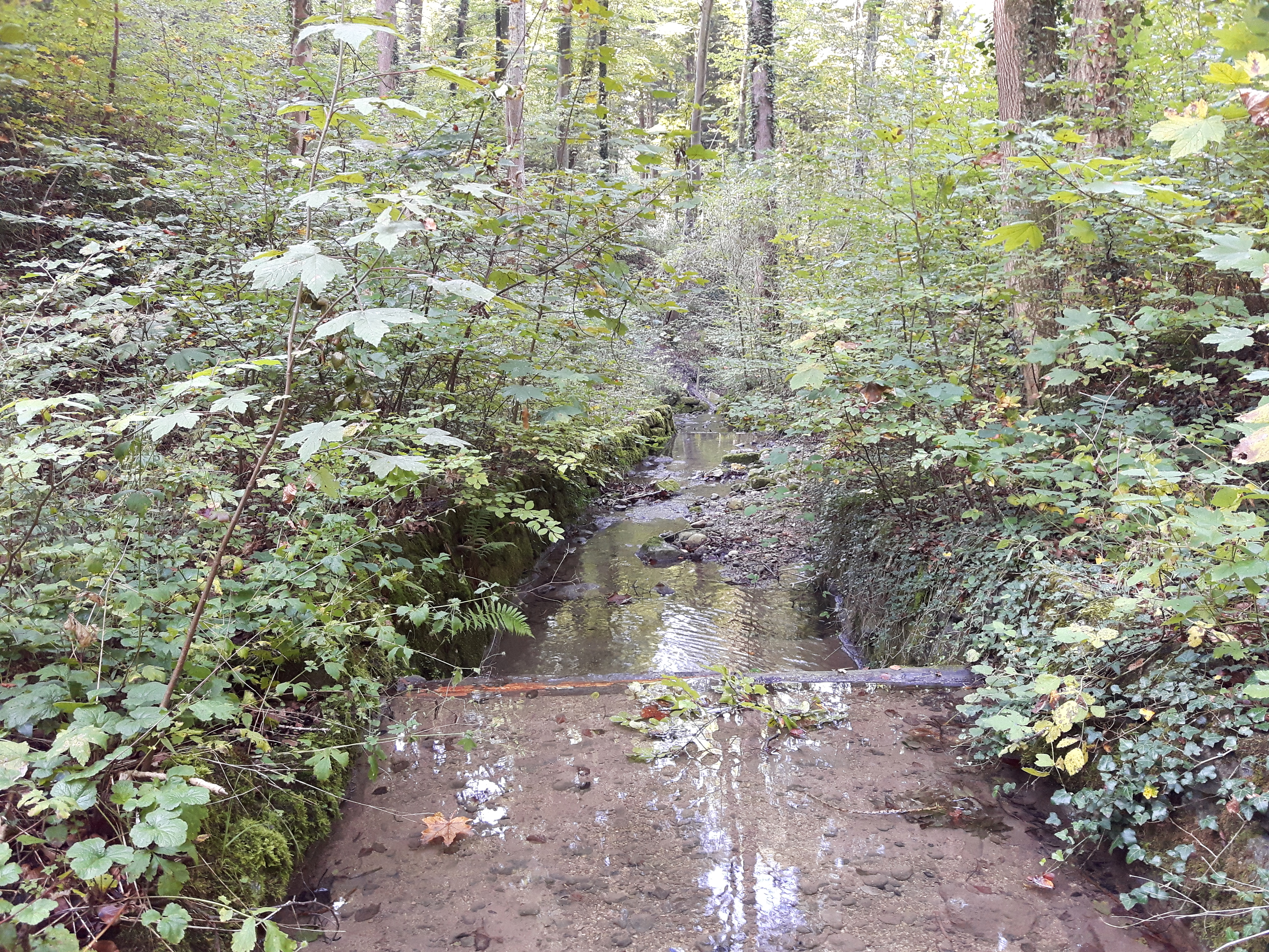 Fürtlibach nach der Einmündung des Weidtobelbachs zwischen Zürich (linkes Ufer) und Oberengstringen